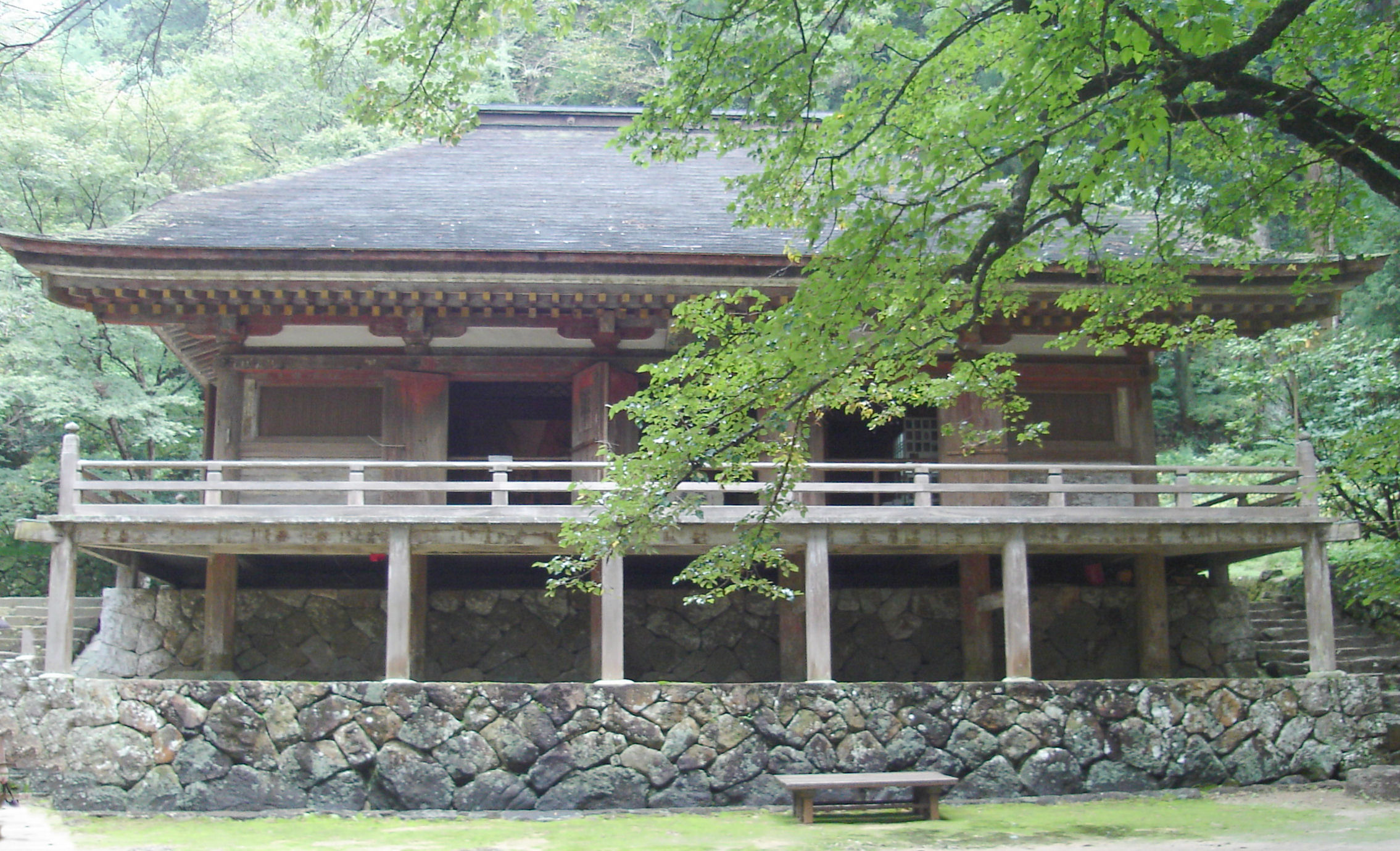 Muroji Kondo